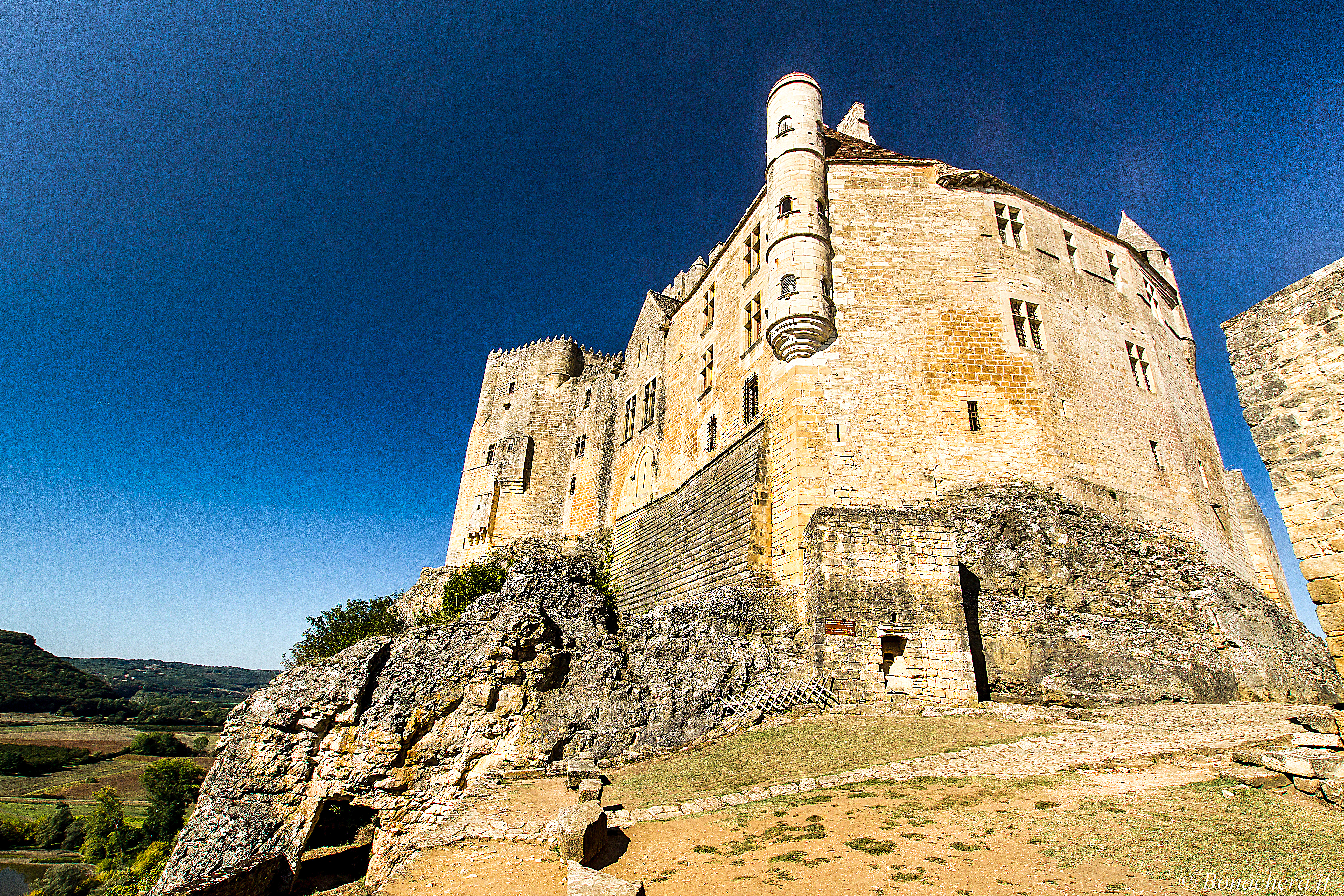 Le château de Beynac